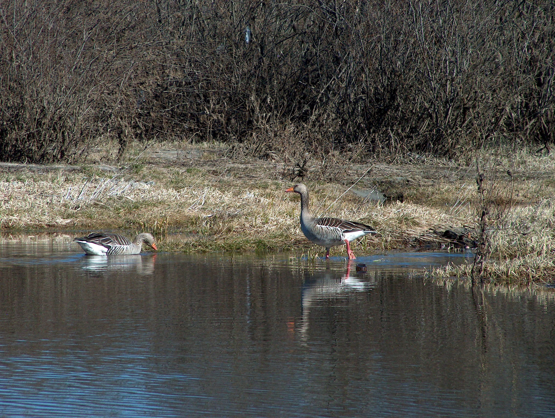 Grågås (Anser anser) utenfor Vesterntangen i Hønefoss